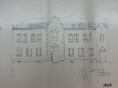 Plànol de la façana de l'actual Escola Pereanton realitzat per l'arquitecte Jeroni Martorell i Terrades, abril de 1918